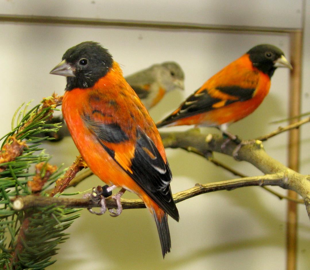 Kapuzenzeisig (Carduelis cucullata), fotografiert auf der Vogelausstellung 2011 Bochum